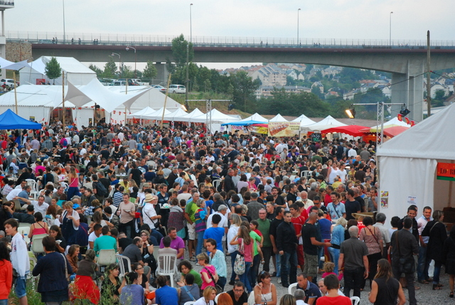 Festenaler ESTIVADA